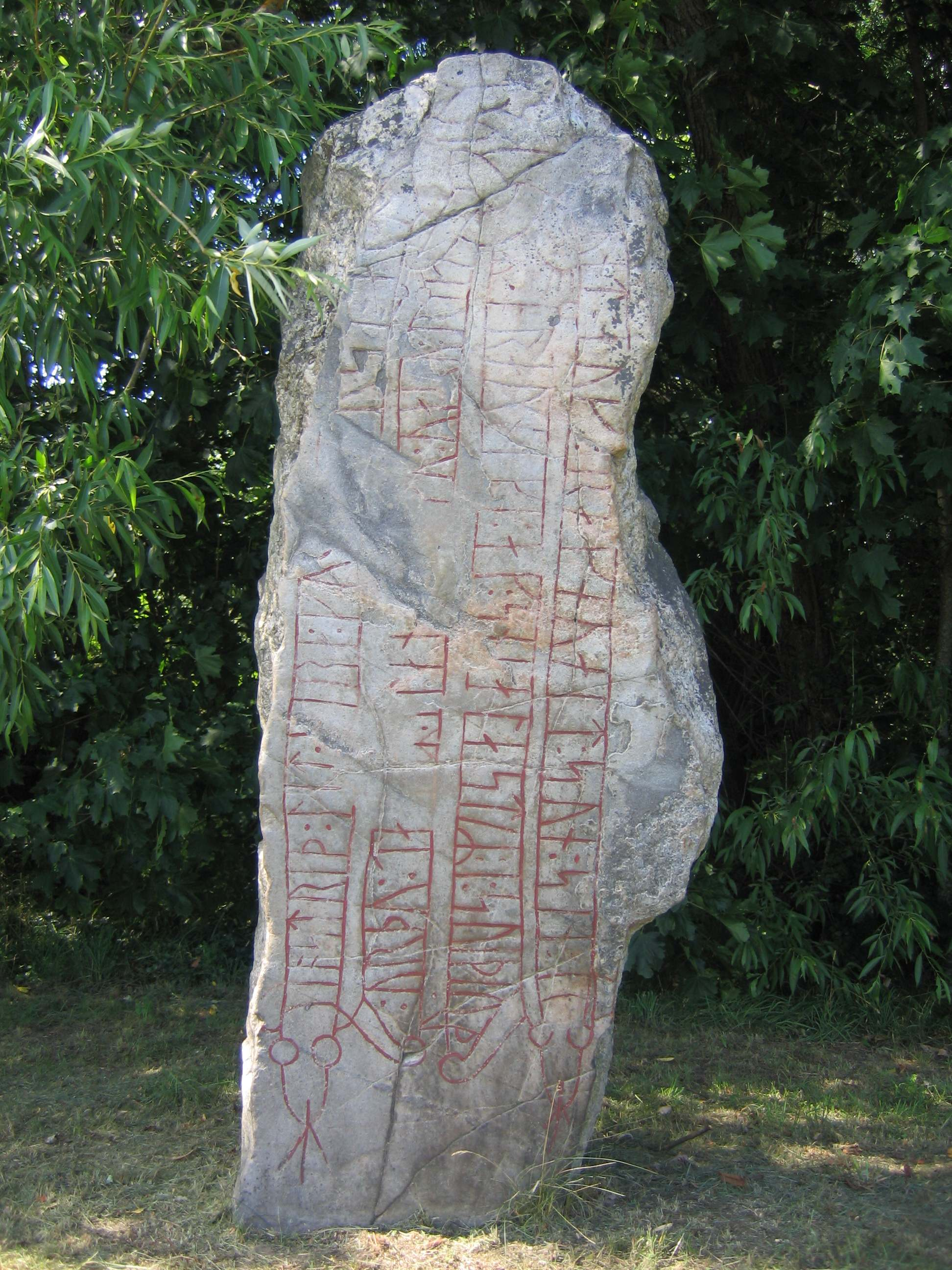 Runestone Sö Fv1948;289